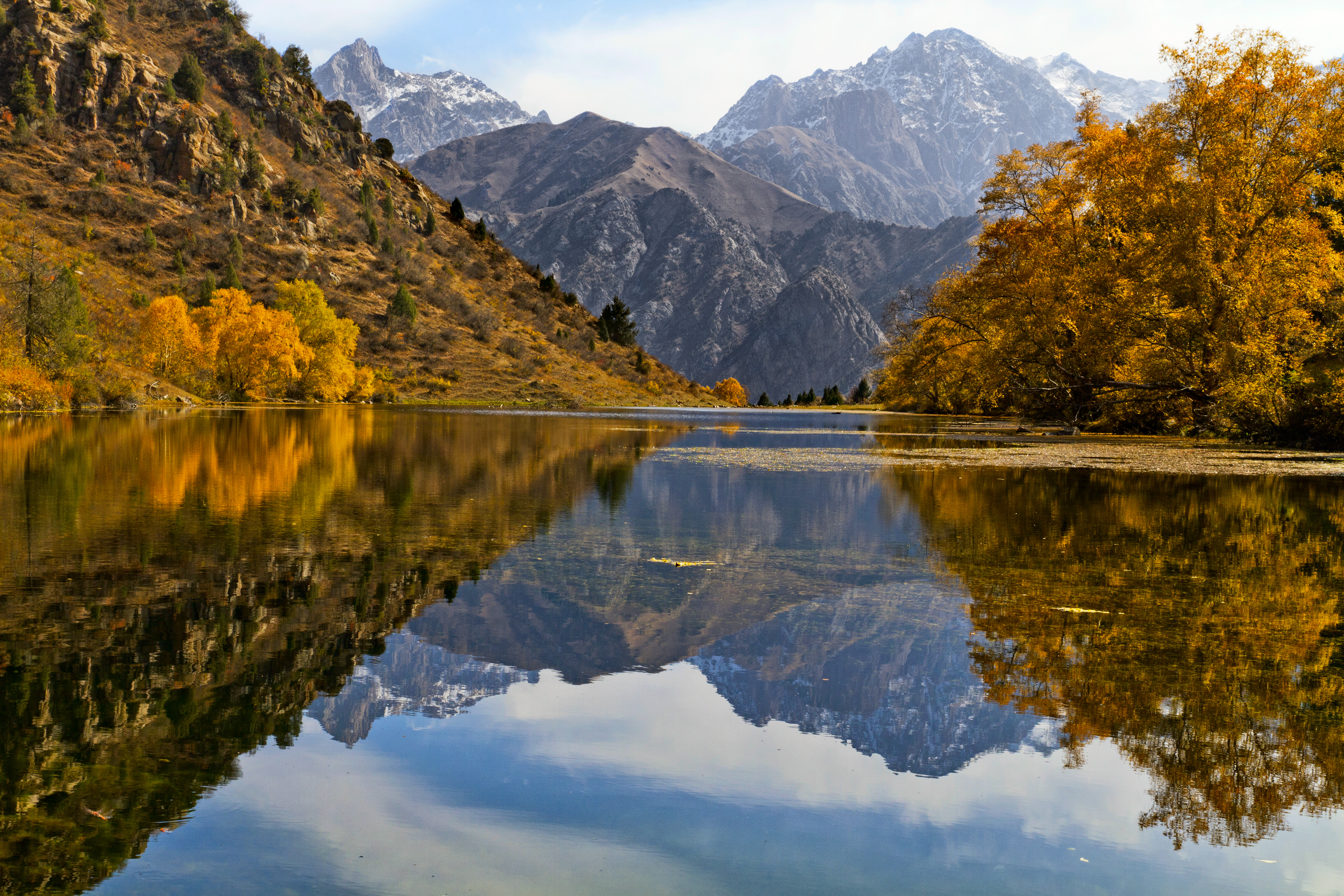 Talas, Kyrgyzstan